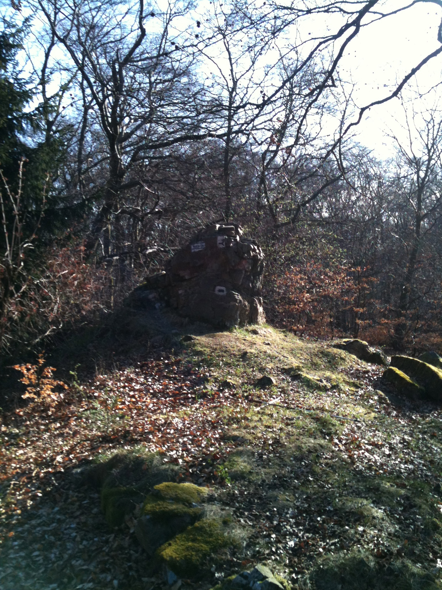 Hohe Kanzel Gipfelstein